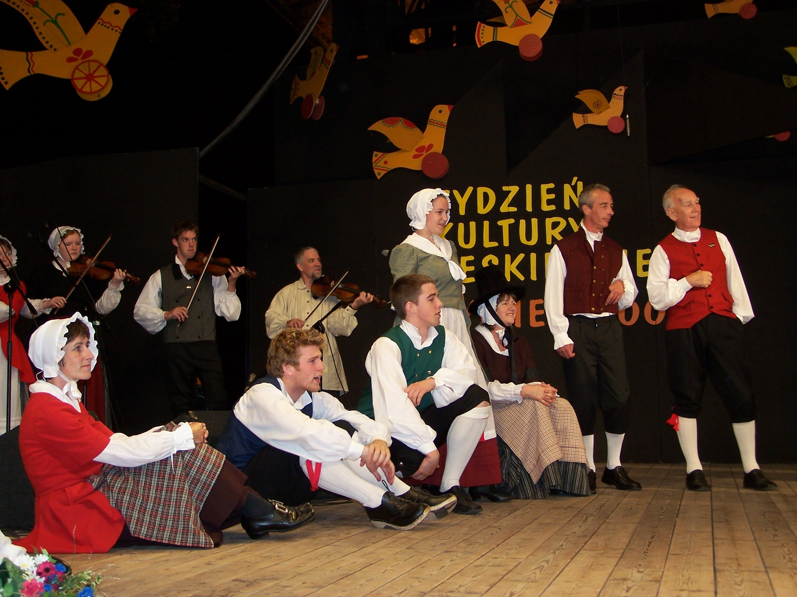 Występ zespołu Dawnswyr Môn z Bethel (Walia) podczas 43. Tygodnia Kultury Beskidzkiej w Żywcu.